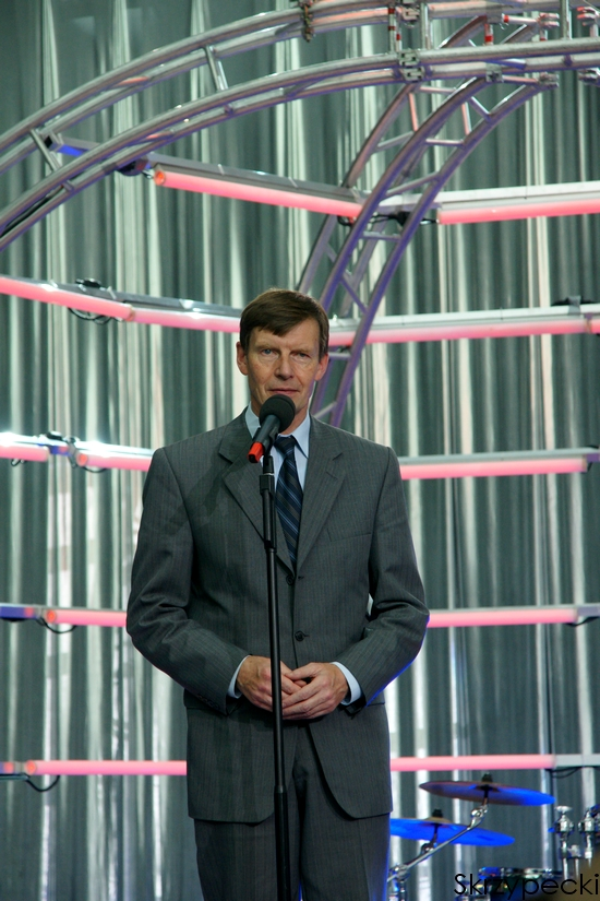 Warszawa, 19 maja 2009 r, konferencja prasowa 46. KFPP Opole 2009, Ryszard Zembaczyński - prezydent Opola.